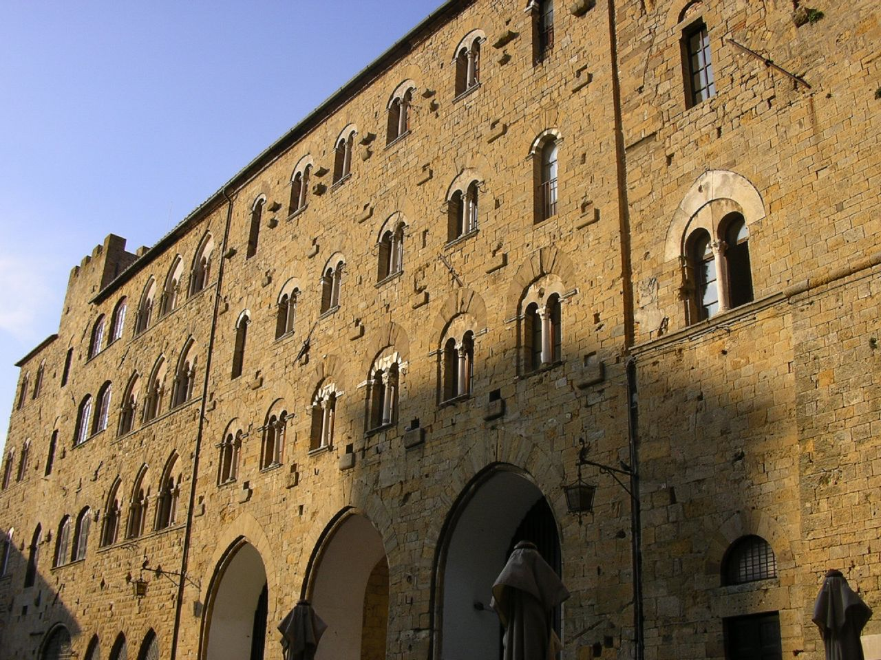 Volterra, Toscana, Italia